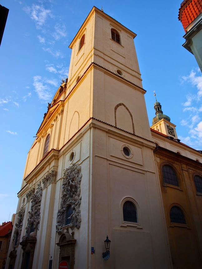 Kostel sv. Jakuba Většího